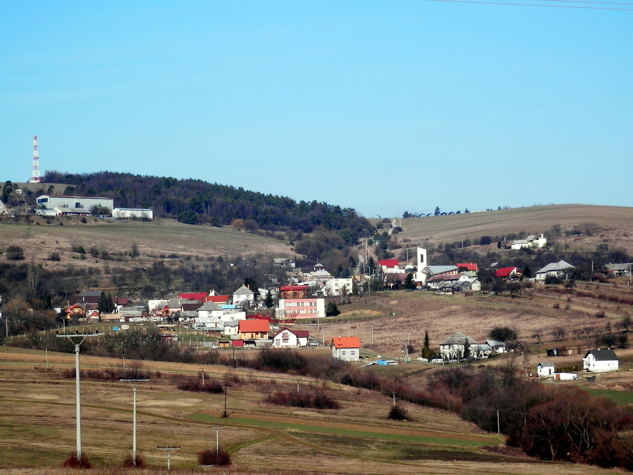 Obec Proč okres Prešov.